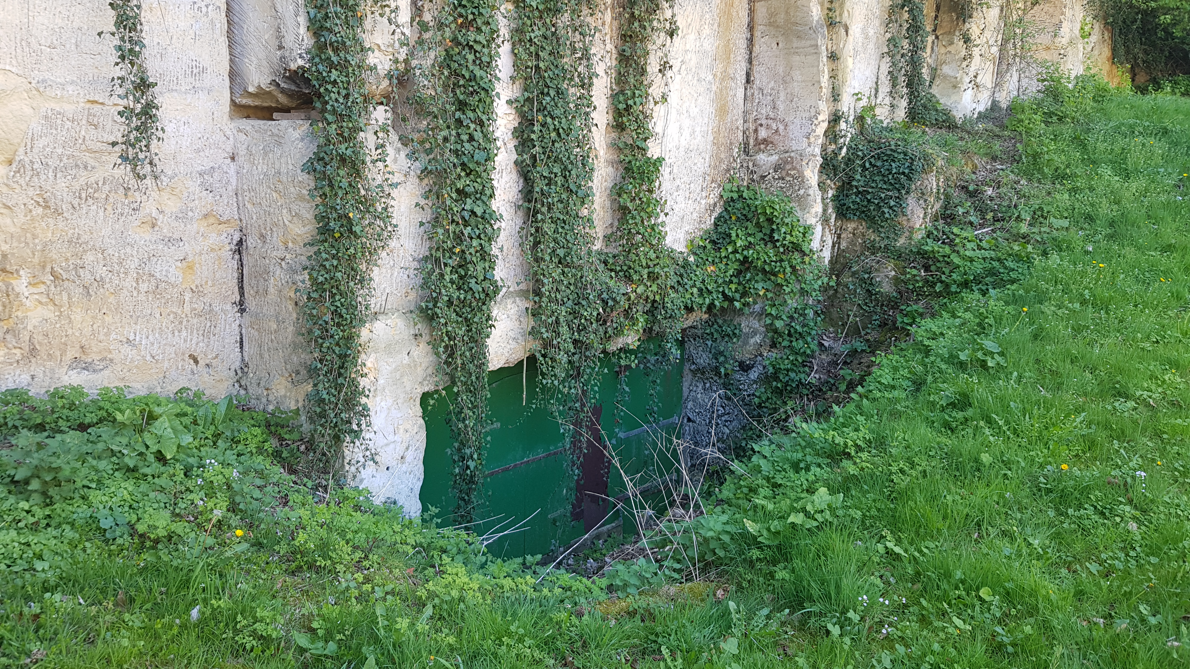 Kerkhofsgroeve, Valkenburg aan de Geul, Nederland